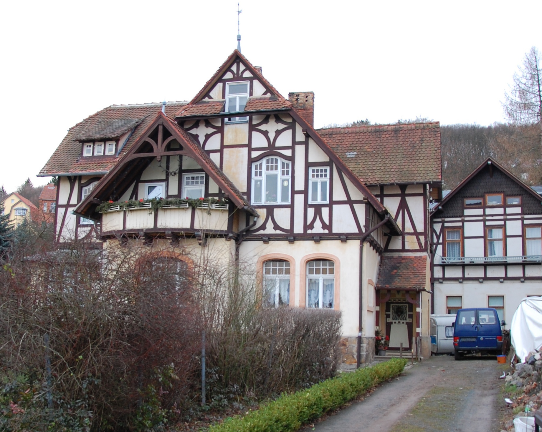 Haus Am Schwedderberg 7a in Gernrode